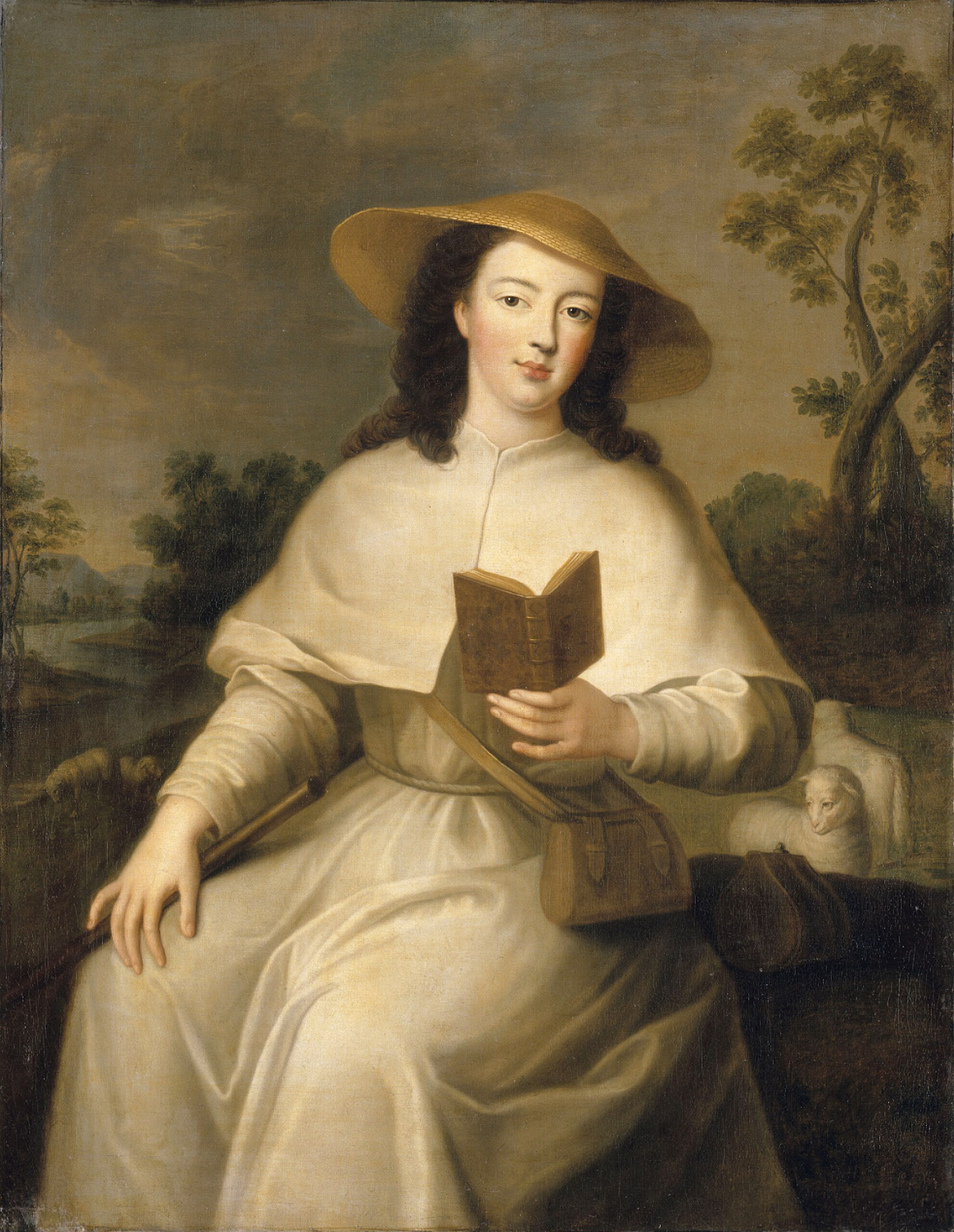 Assise en costume de pèlerine, lisant et gardant des moutons (1698-1743)